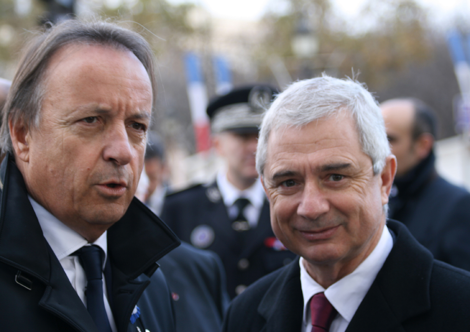 A gauche, M Jean-Pierre Bel(président du Sénat) et à droite M. Claude Bartolone (président de l'Assemblée nationale) durant les cérémonies du 11 novembre 2012